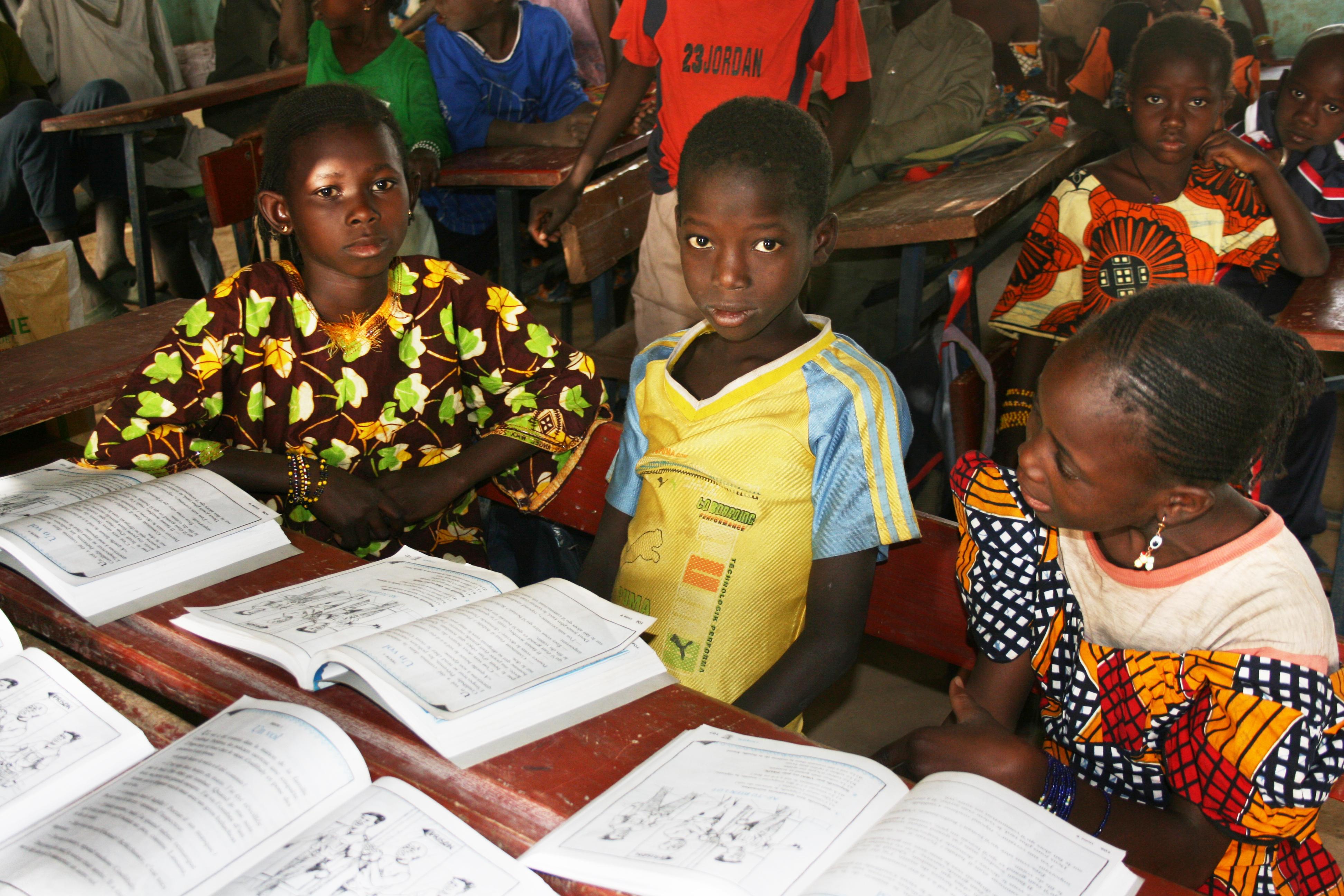 enfants scolarisées à l'école du village de Maréna, région de Kayes, Mali